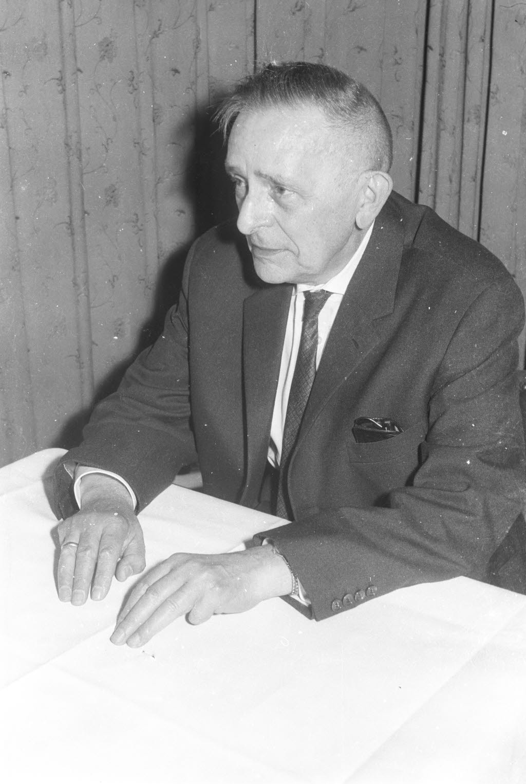 Der ehemalige Kieler Propst spricht auf einer Vortragsveranstaltung der evangelisch-lutherischen Kirche zur Kieler Woche 1963.